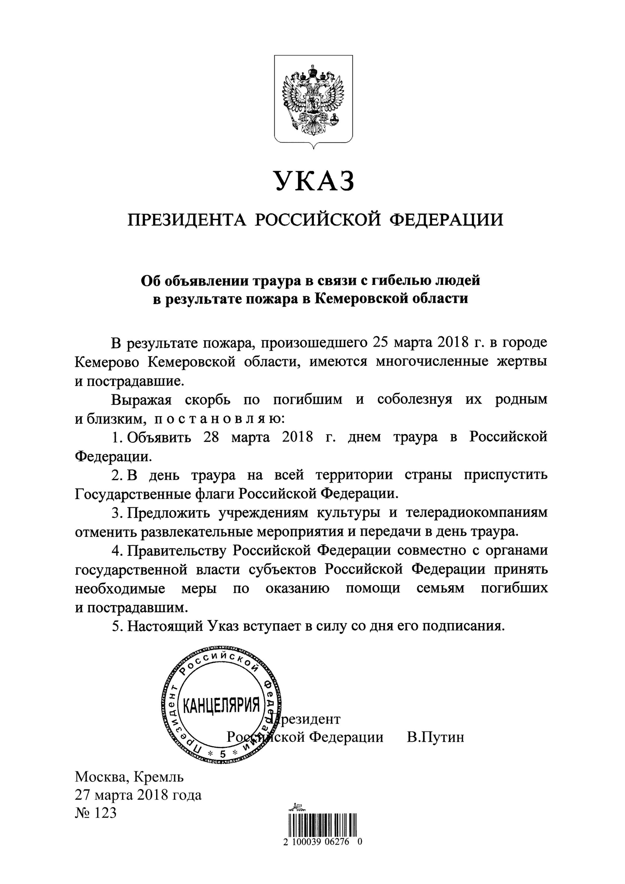 Указ Президента Российской Федерации Владимира Путина № 13 от 27 марта 2018 года «Об объявлении траура в связи с гибелью людей в результате пожара в Кемеровской области»